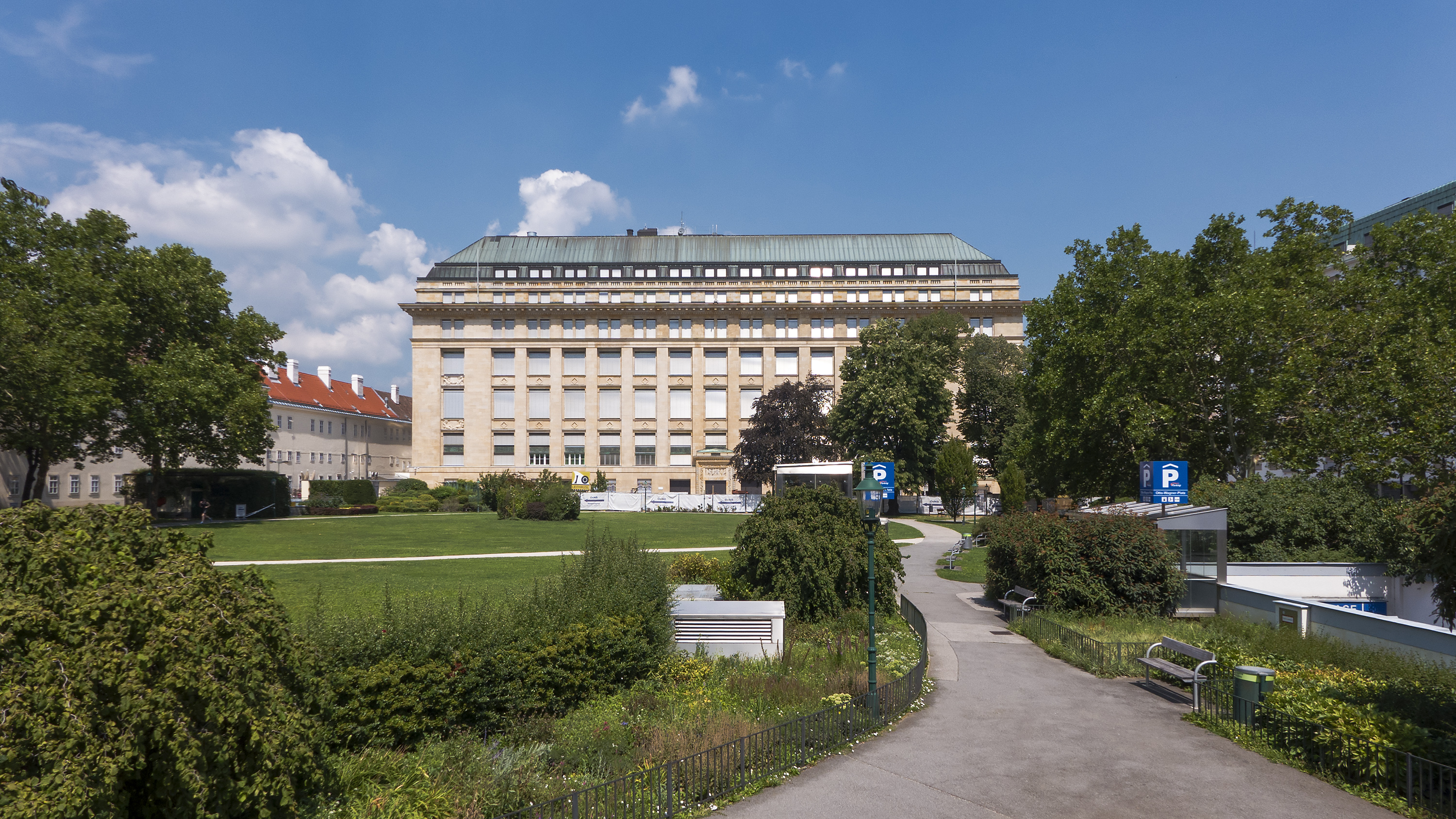 Ostarrichi-Park in Wien 9